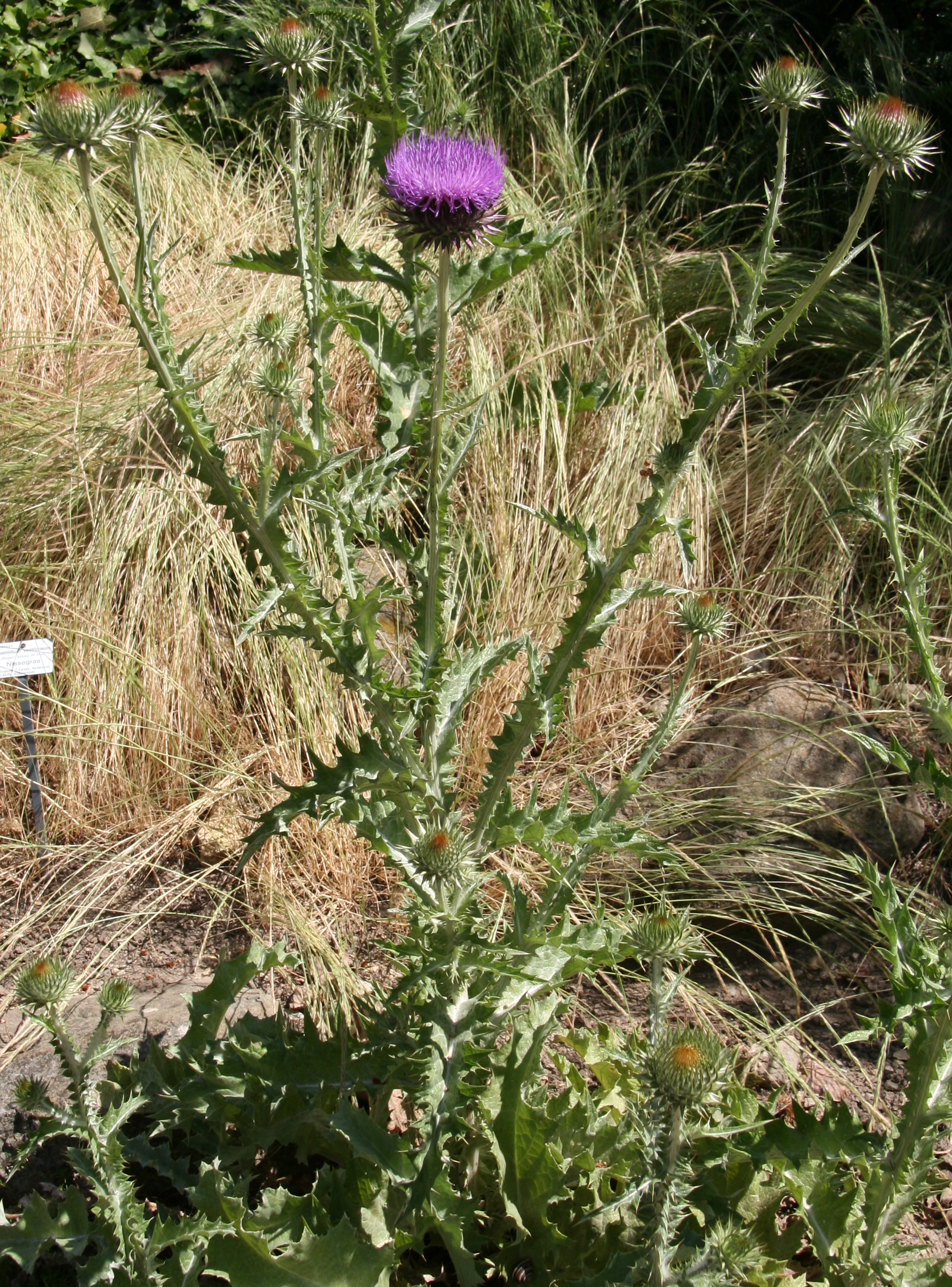 Onopordum algeriense im Botanischen Garten Dresden